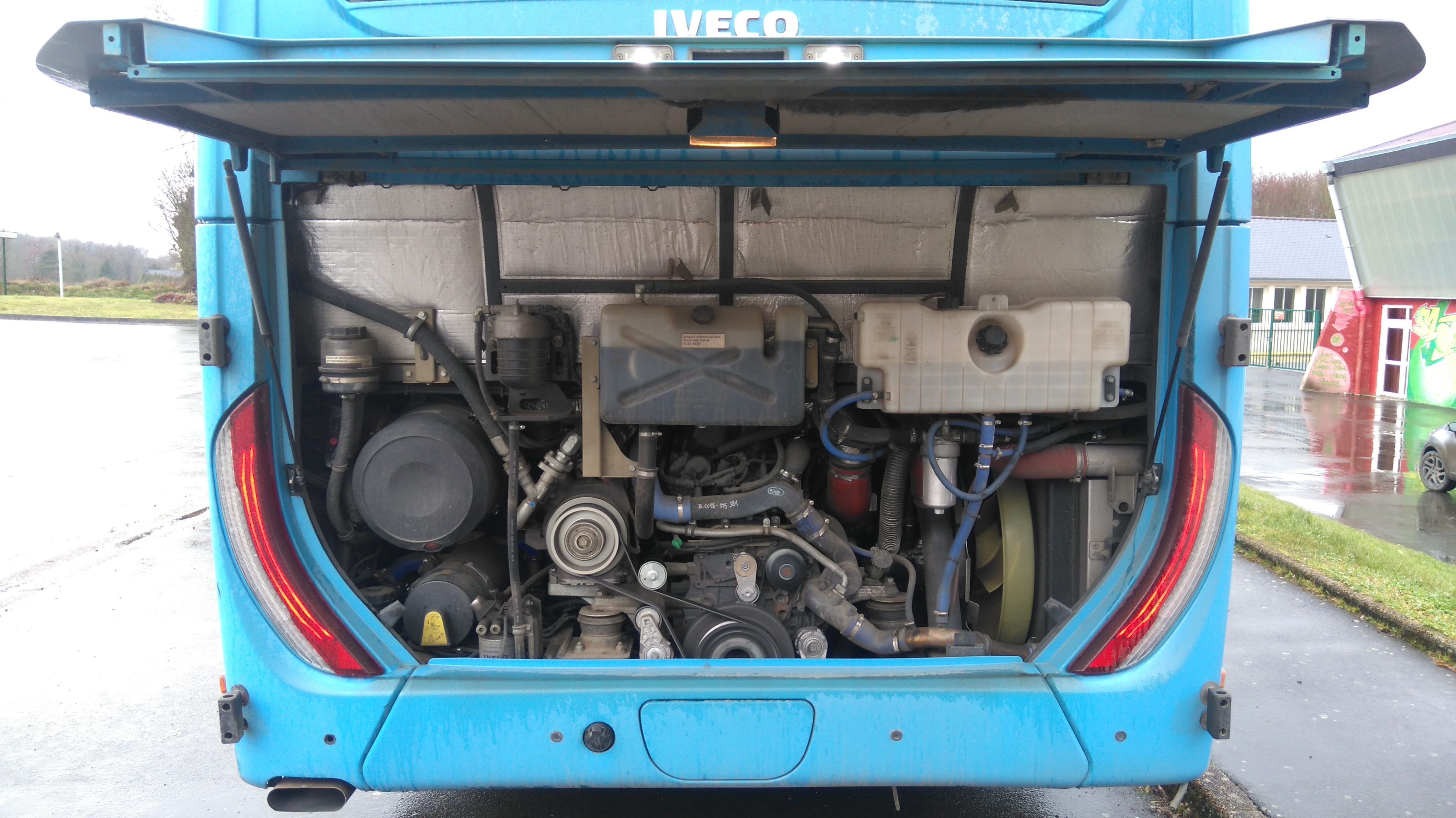 Iveco Bus Crossway Line 13 - Ti'Bus (moteur)